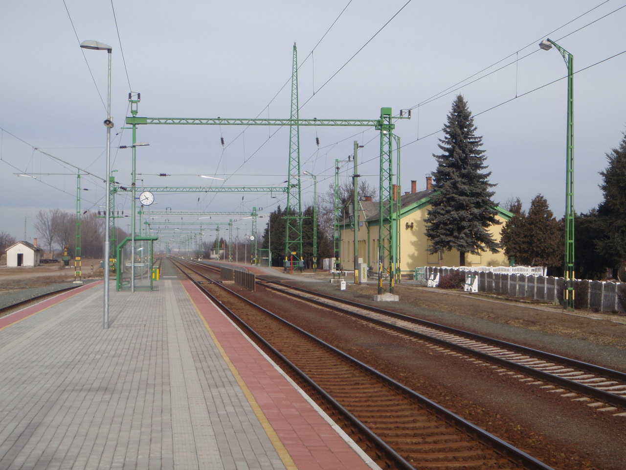 Lövő vasútállomása